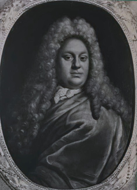 Portretschildering van Adriaan Hendrik van Slijpe (1664-1714), burgemeester van Maastricht. Privécollectie Apeldoorn(?).